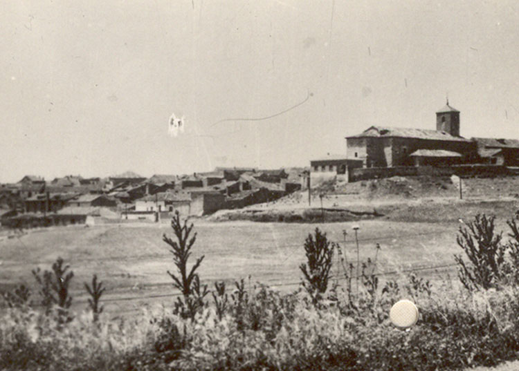 Vista panorámica - Zaratán (Valladolid) - Colección de cromos álbum de Valladolid editado por la Caja de Ahorros Provincial en 1962. Vista de las casas del pueblo, de ladrillo y adobe, en torno a su iglesia que domina los alrededores. - Fotografía 60 x 42 B/N